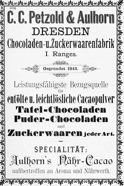 Anzeige der Schokoladen- und Zuckerwarenfabrik C. C. Petzold & Aulhorn in Dresden im Adreßbuch der sächsischen Industrie von 1897